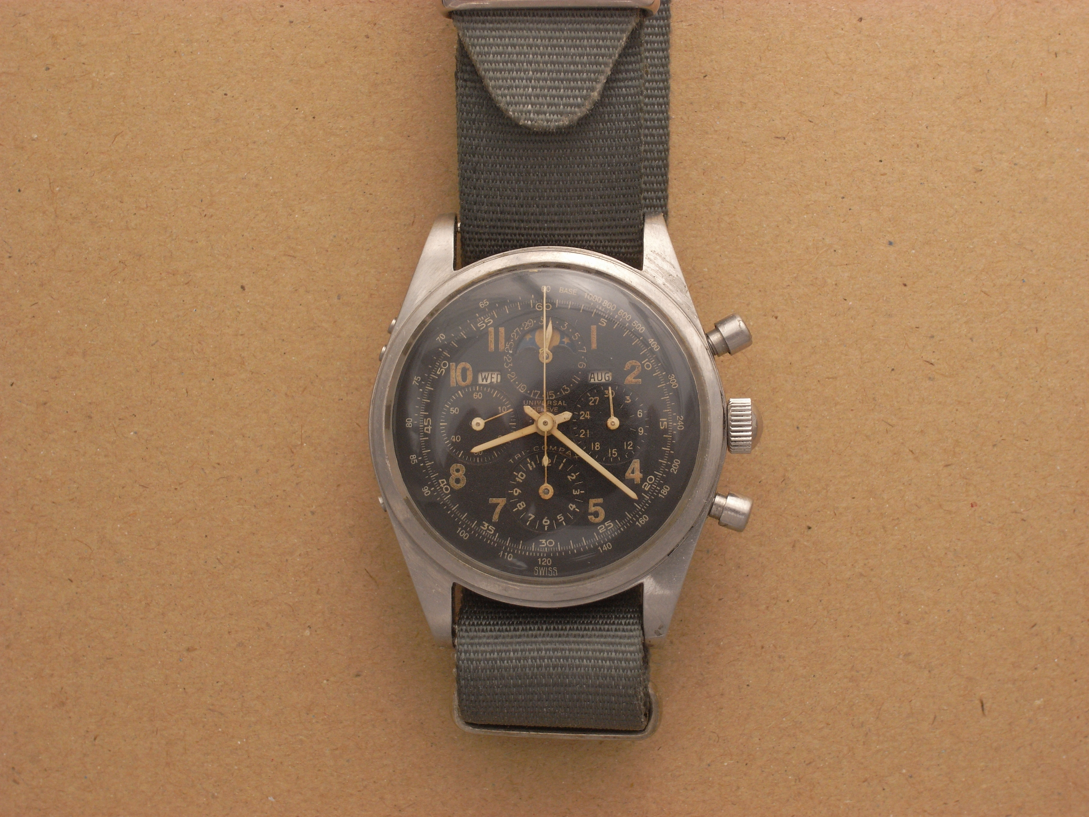 Universal-Geneve Tri-Compax